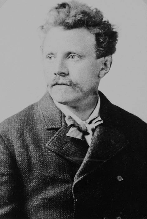 The younger Heinrich Weltring (1847-1917), a German sculptor